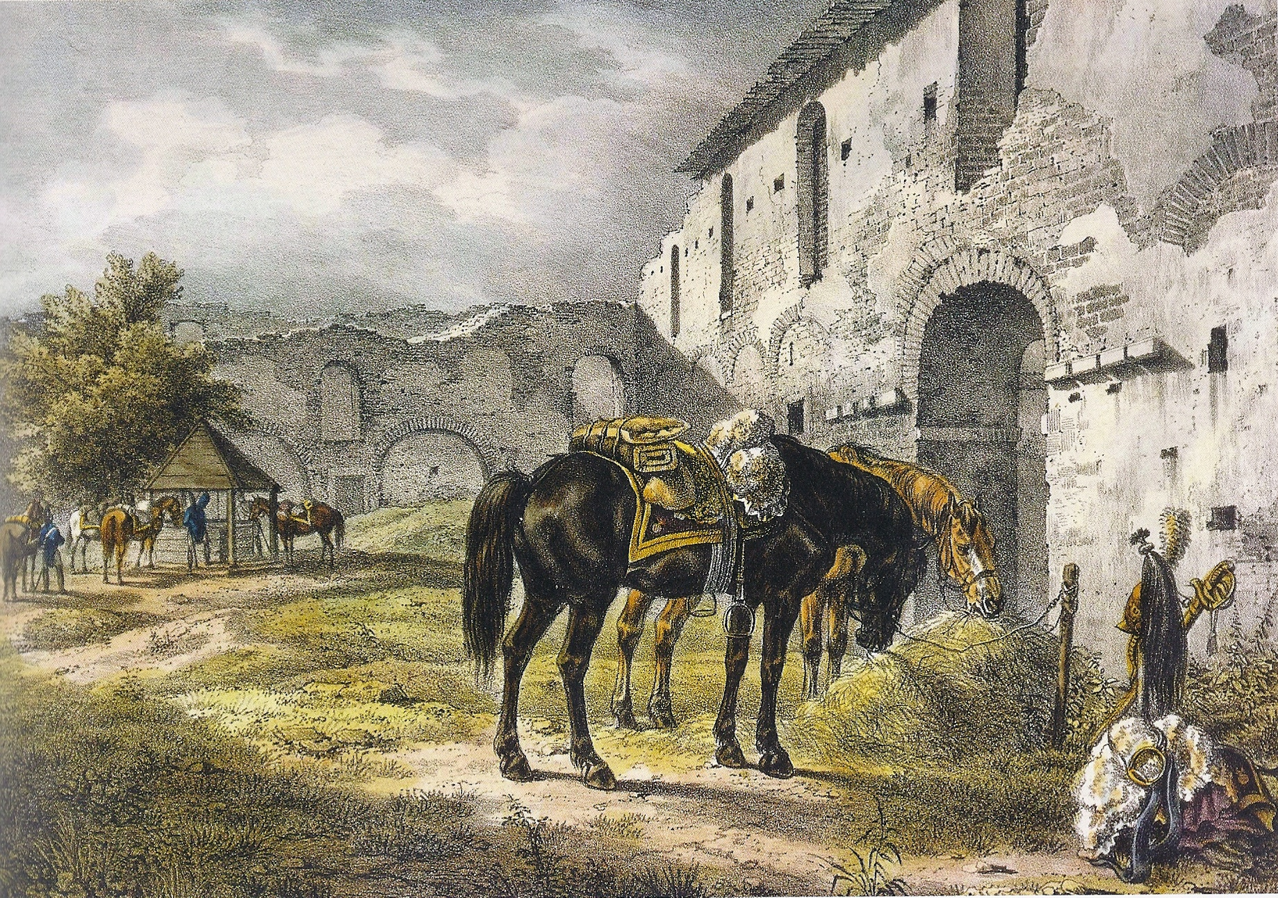 Беларуская (тарашкевіца): Гальшаны (Halšany), 11 ліпеня 1812. У дворыку замка